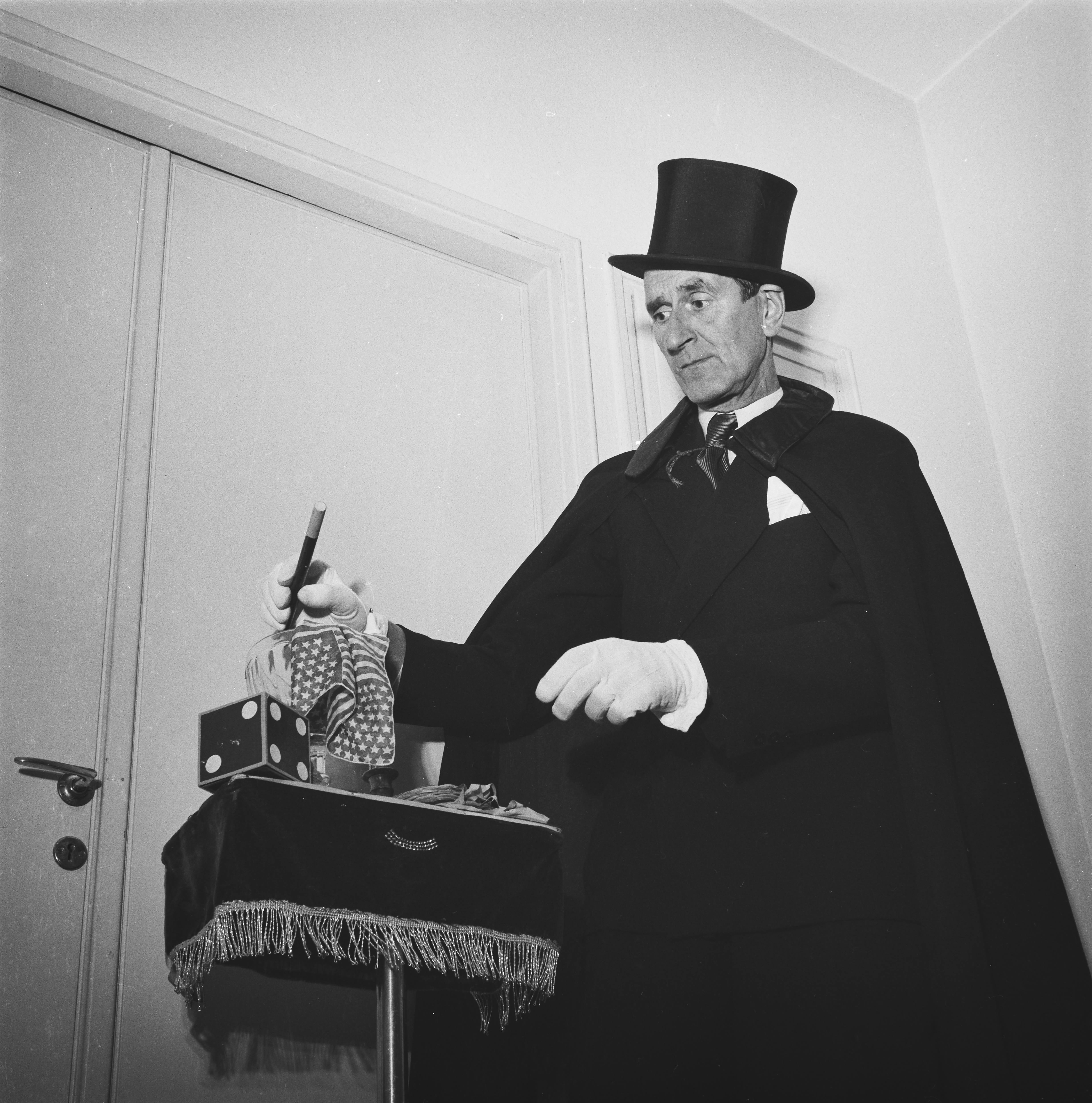 Taikuri Bruno Nurmi-Johansson (1900–1979) esiintymässä Salossa.